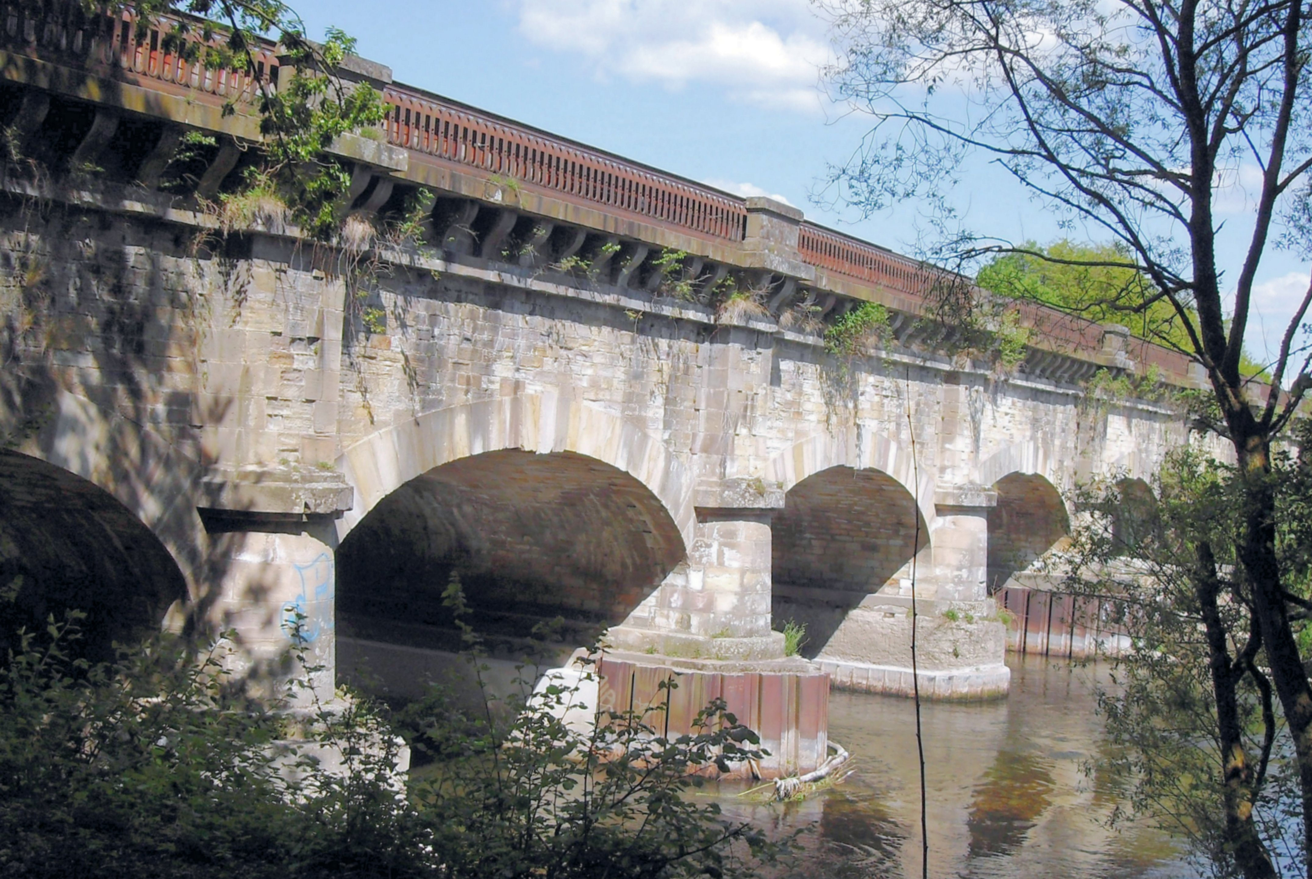 Branche d'Épinal (Canal des Vosges), pont-canal sur la Moselle à Golbey